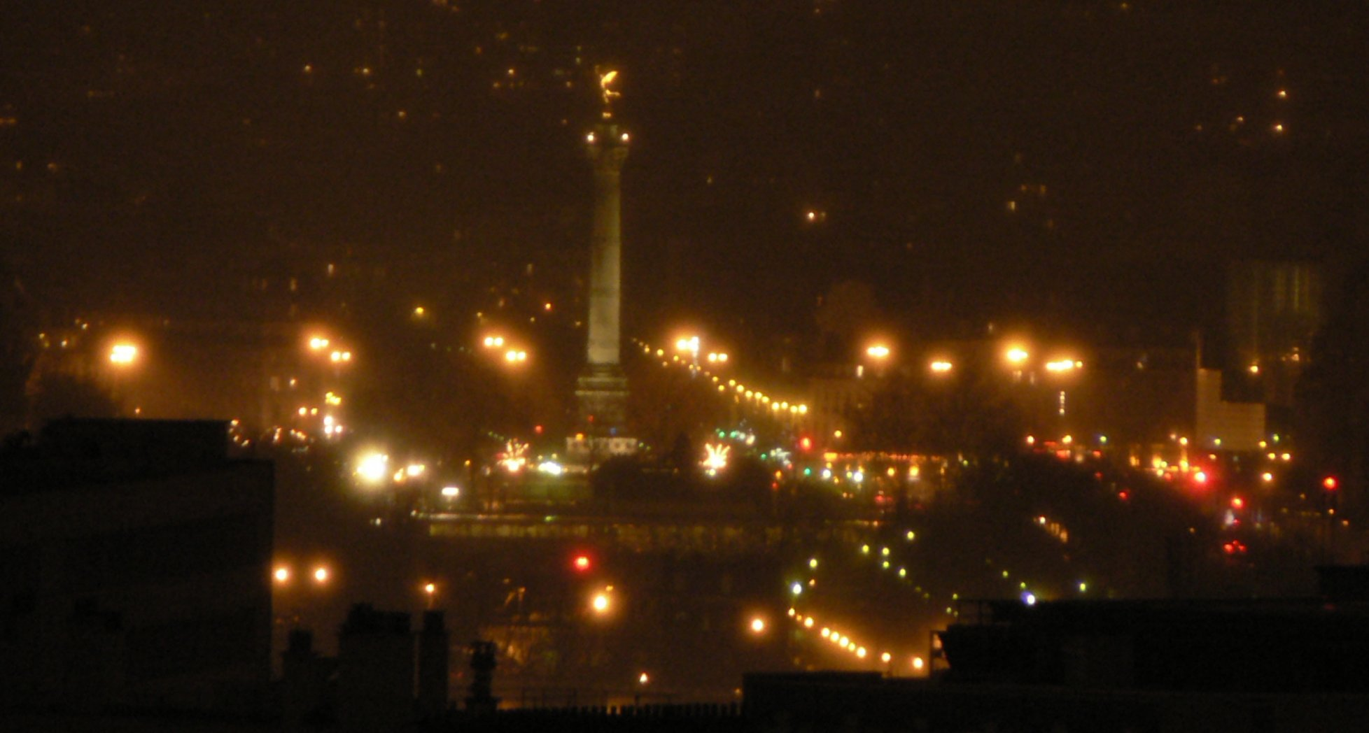 Paris, Place de la Bastille